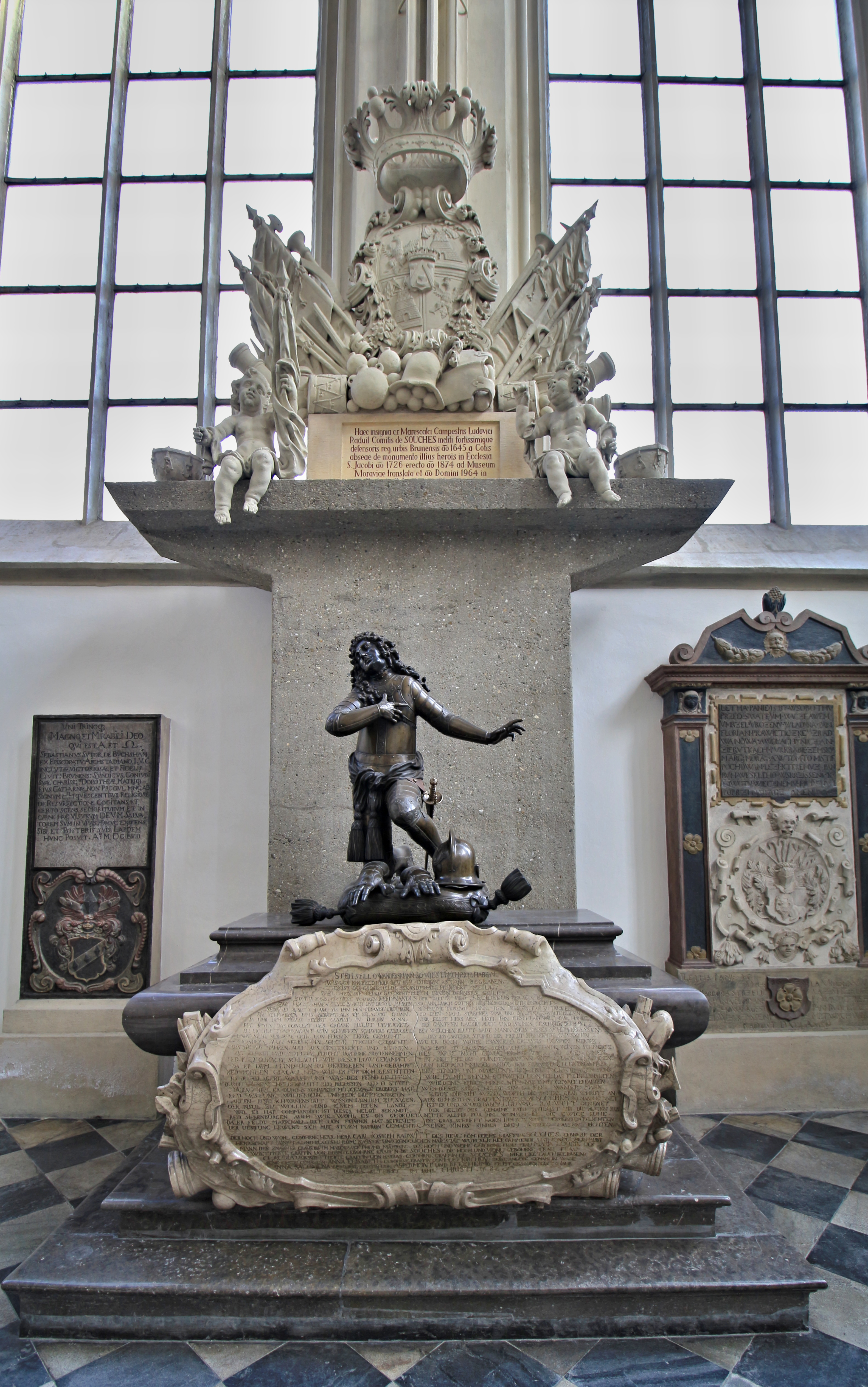 Brno, kostel sv. Jakuba, hrobka hraběte de Souches